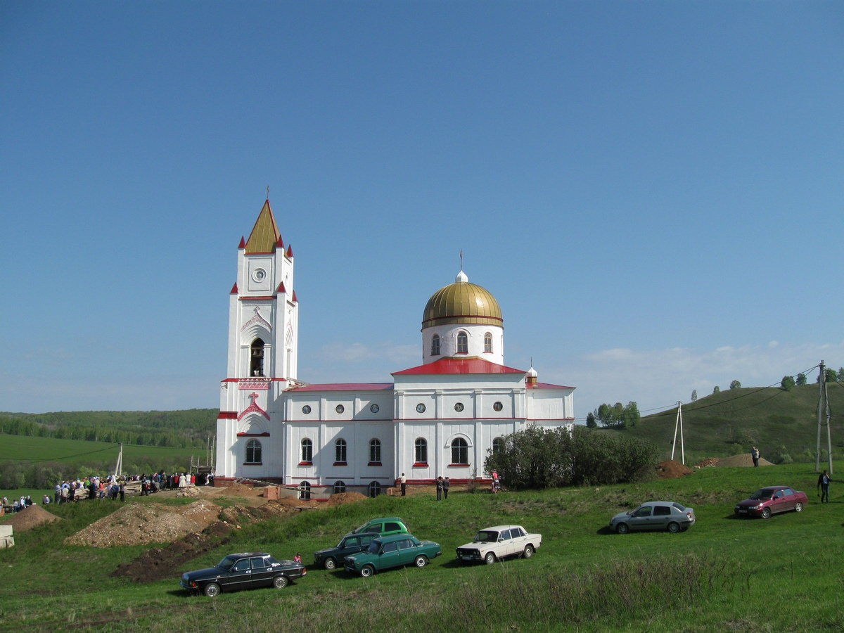 Фотография службы проведенной 23 мая 2011 года, в честь святого Николая чудотворца